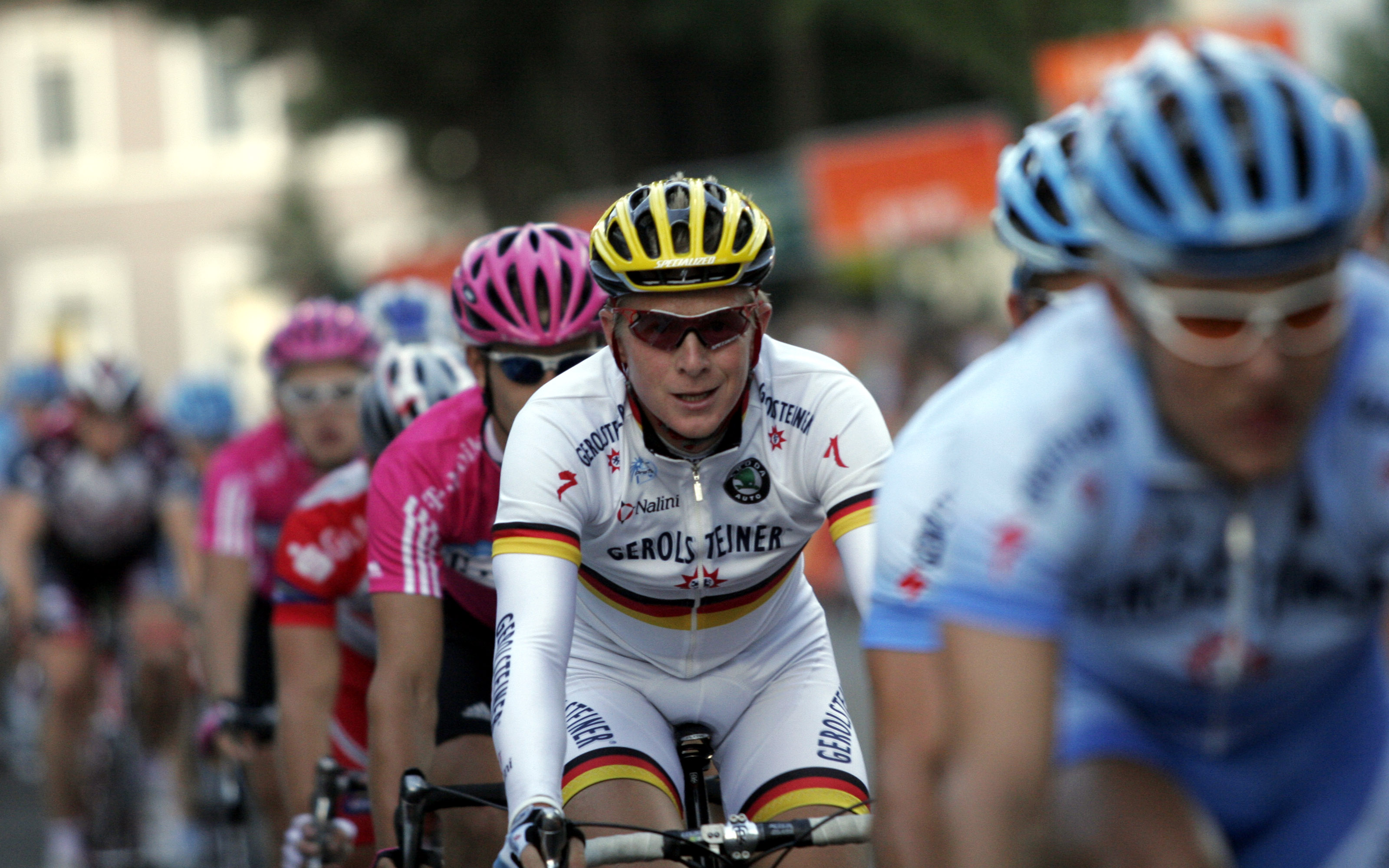 Fabian Wegmann im Trikot des Deutschen Meisters beim Entega Grand Prix in Lorsch (Südhessen)